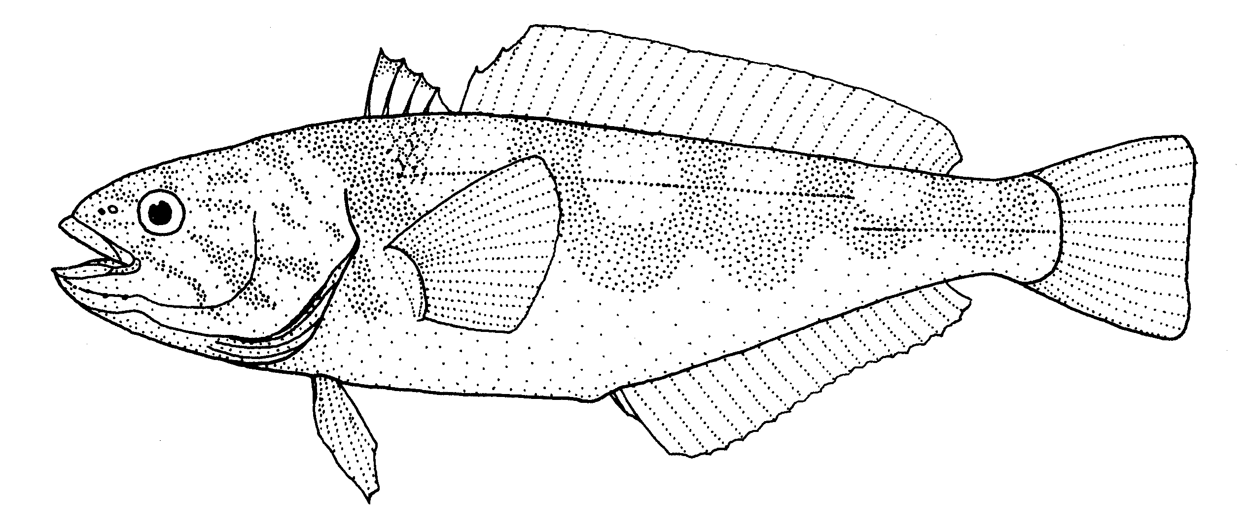 Paranotothenia magellanica (Maori cod)